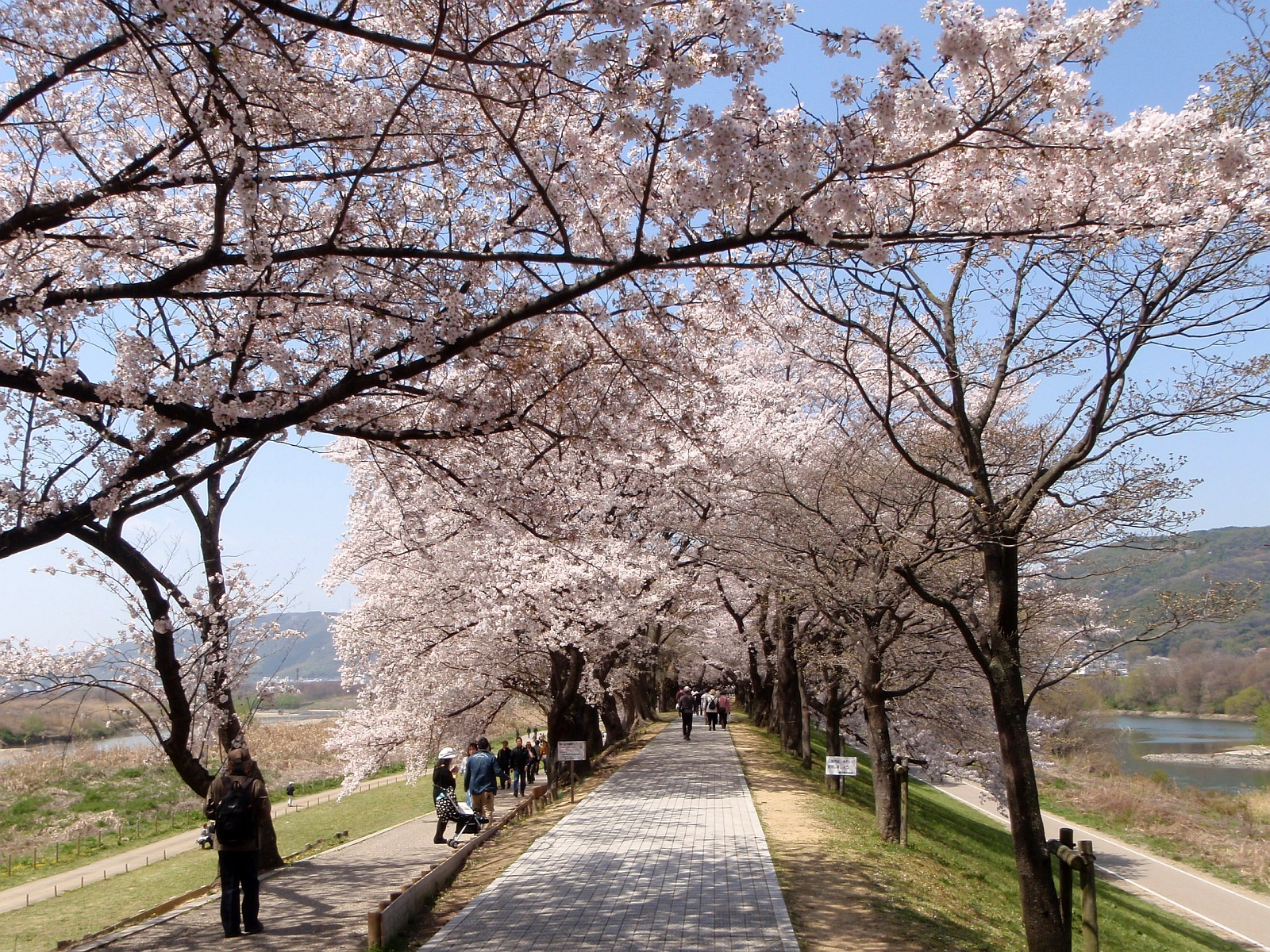 木津川（写真左側）と宇治川を二分する背割堤に咲き誇るソメイヨシノ。淀川河川公園のうち、景観保全地区のひとつ「背割堤地区」に指定されている。（京都府八幡市にて）